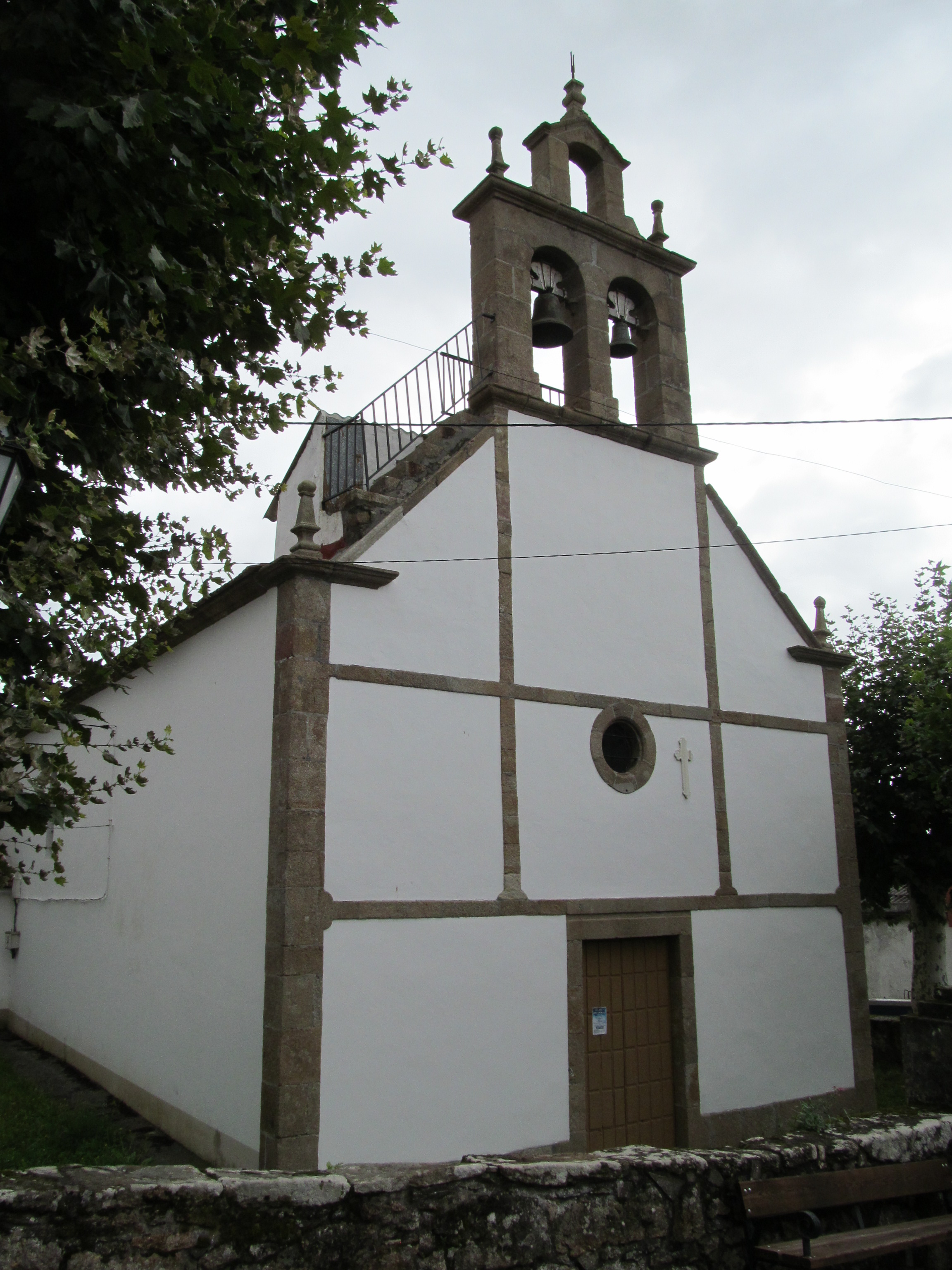 Iglesia parroquial de San Pedro de Cervás, en Ares, Galicia, España.